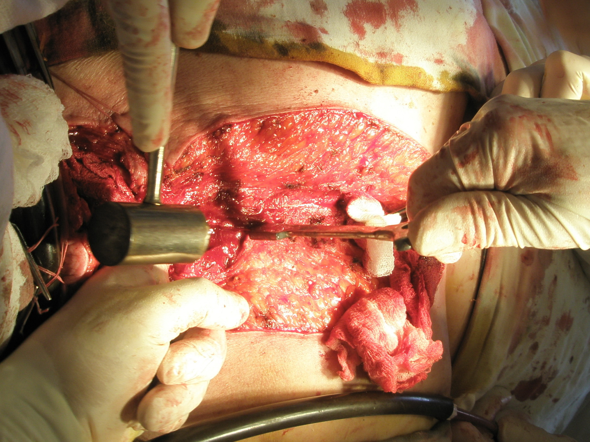 Полная продольная срединная стернотомия по поводу загрудинного зоба. Собственно стернотомия механическим стернотомом.